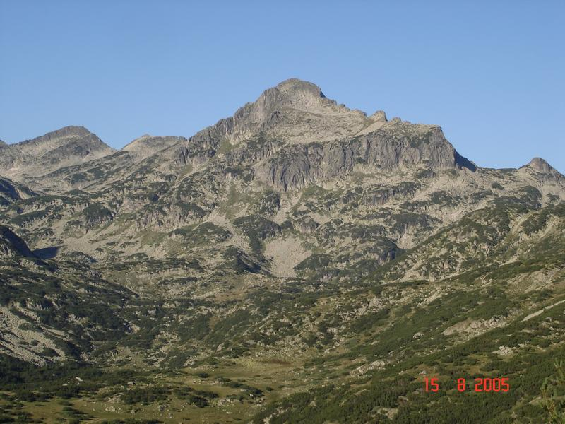 Jngal - summit in Pirin mountain in Bulgaria